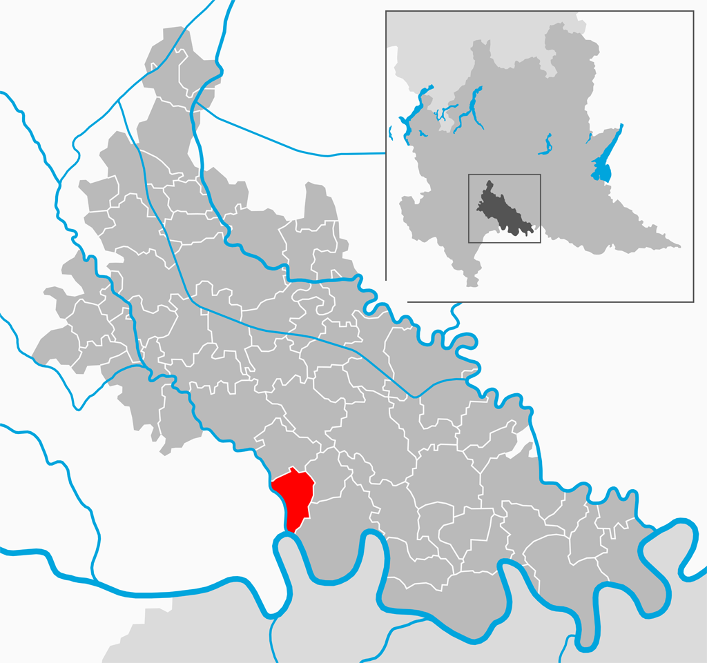 Il comune di Orio Litta nella provincia di Lodi